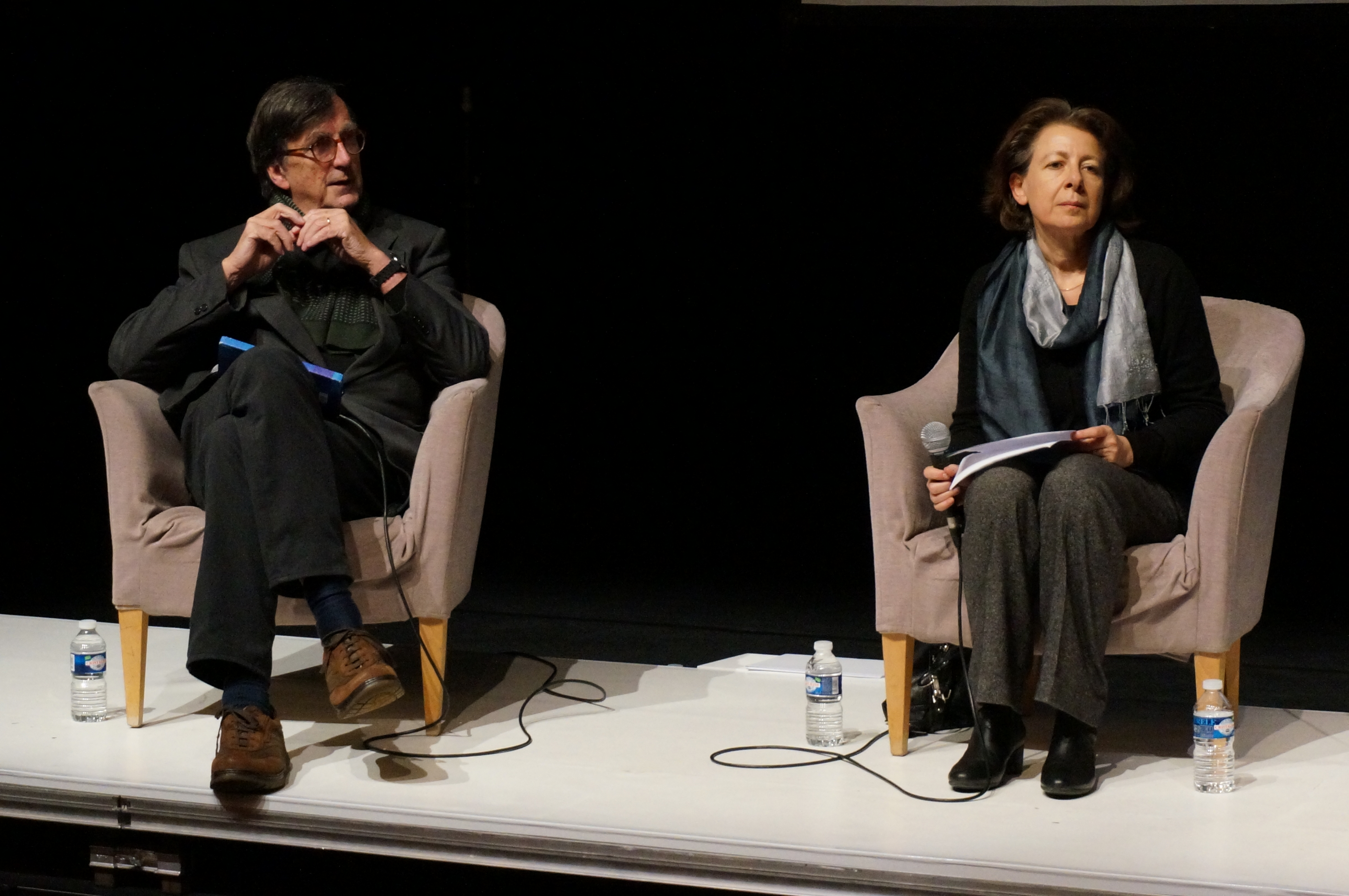 lors de "reims scènes d'Europe", Agent de la géohistoire.